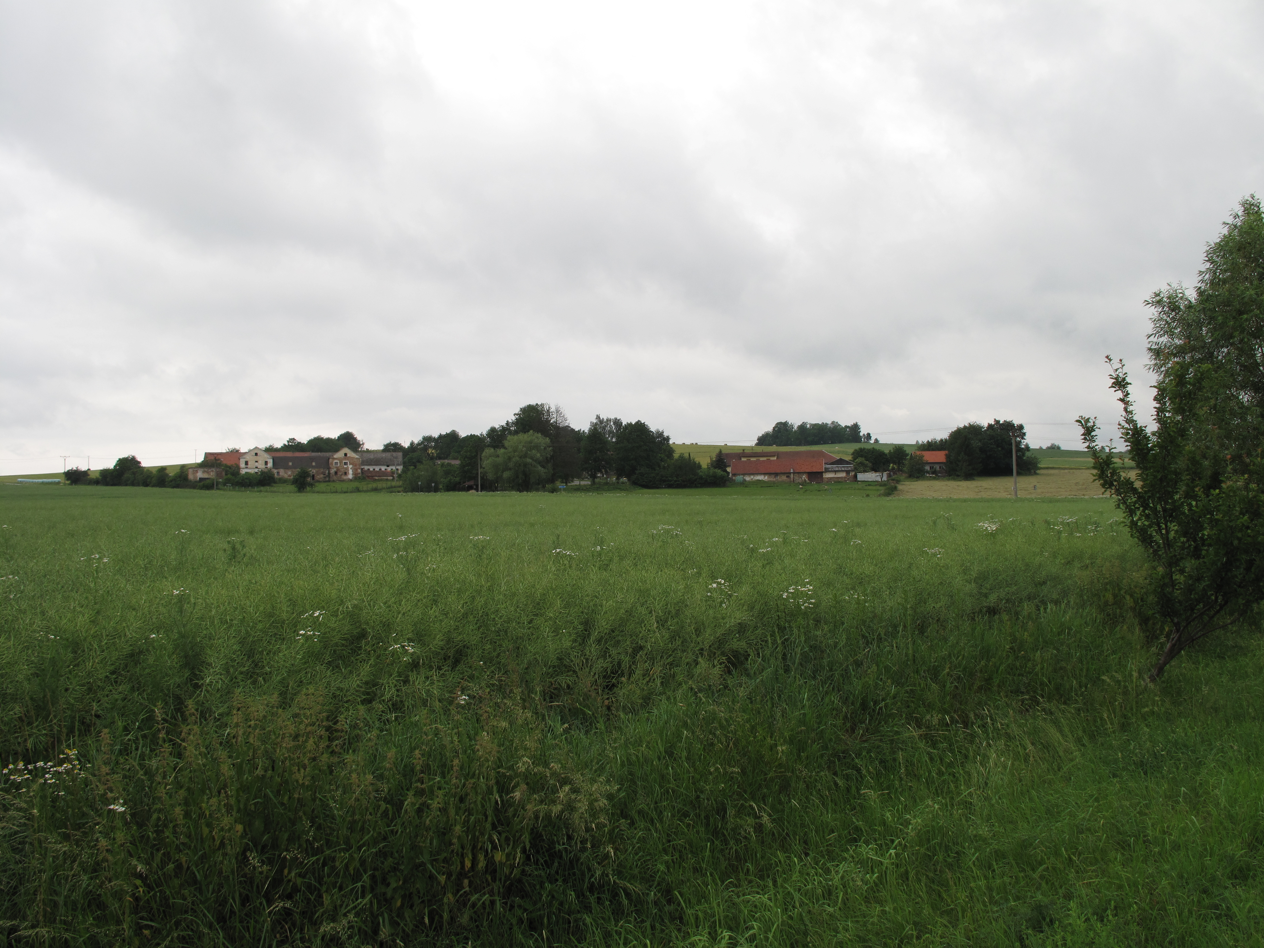 Záhoříčko (Nemyšl), Česká republika.